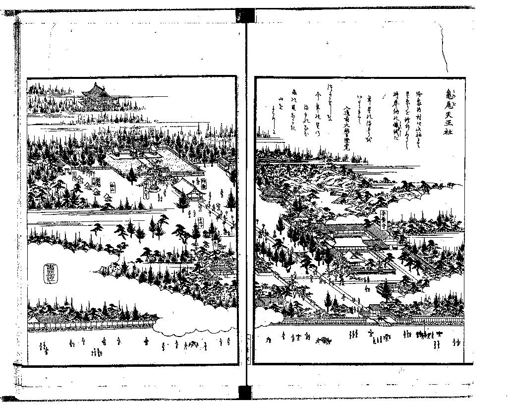 亀尾天王社と称していた那古野神社（『尾張名所図会. 前編 巻１ 愛智郡』より「亀尾天王社」）